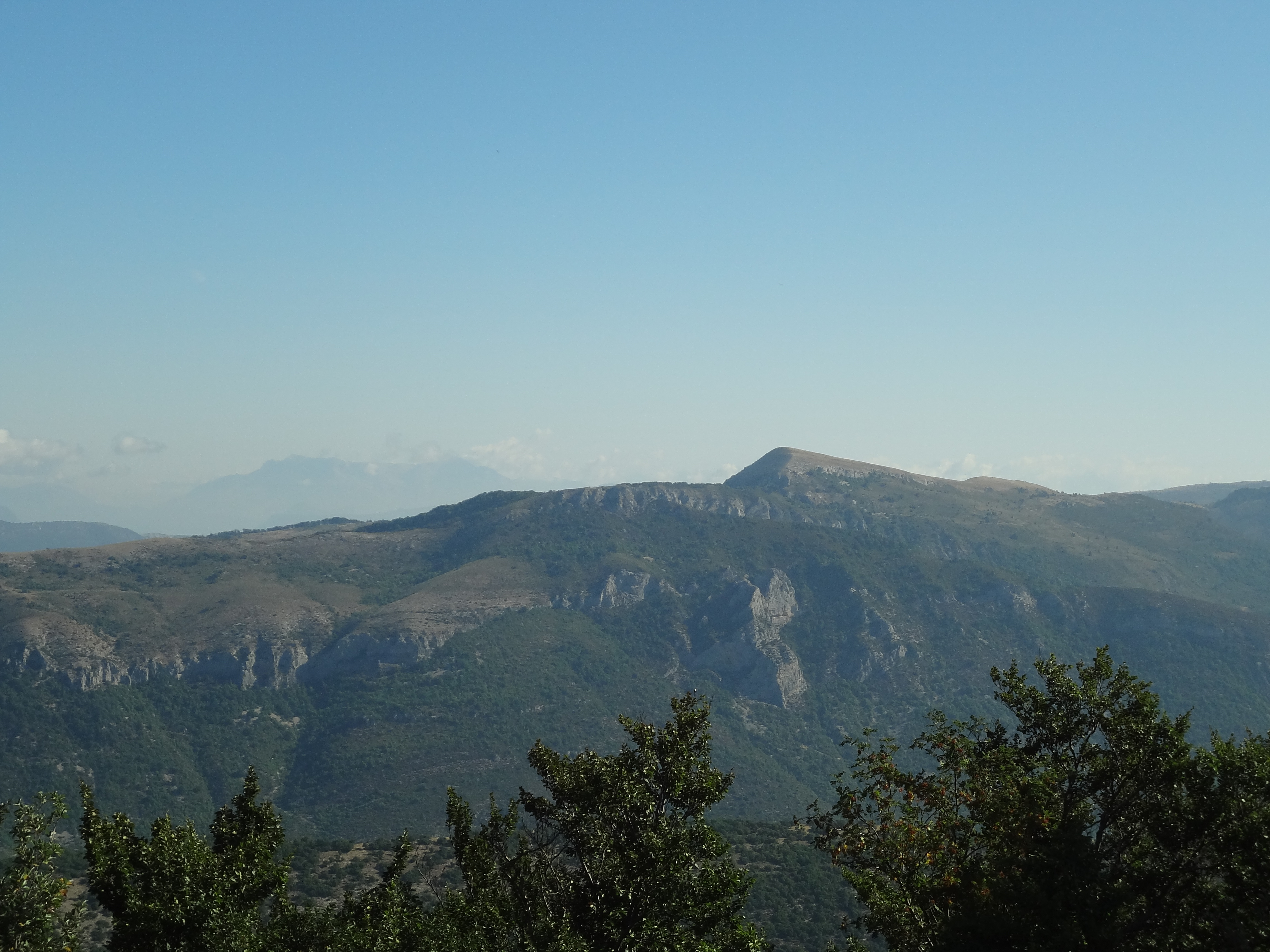 Crête des Serres, limitrophe de Curel (Alpes-de-Haute-Provence) et de Montfroc (Drôme).